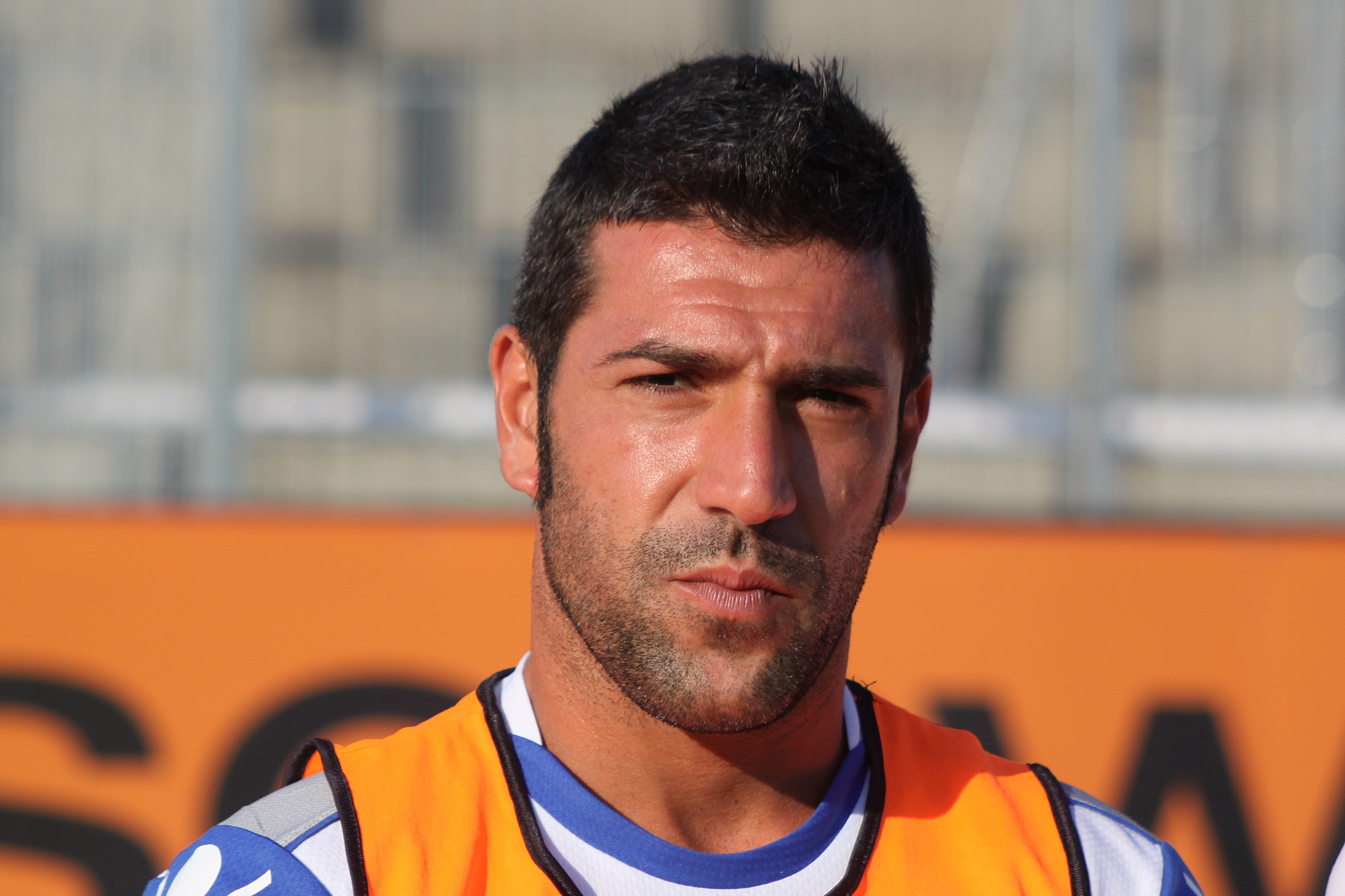 Francesco Montervino - SSC Neapel (2) Francesco Montervino - Società Sportiva Calcio Napoli